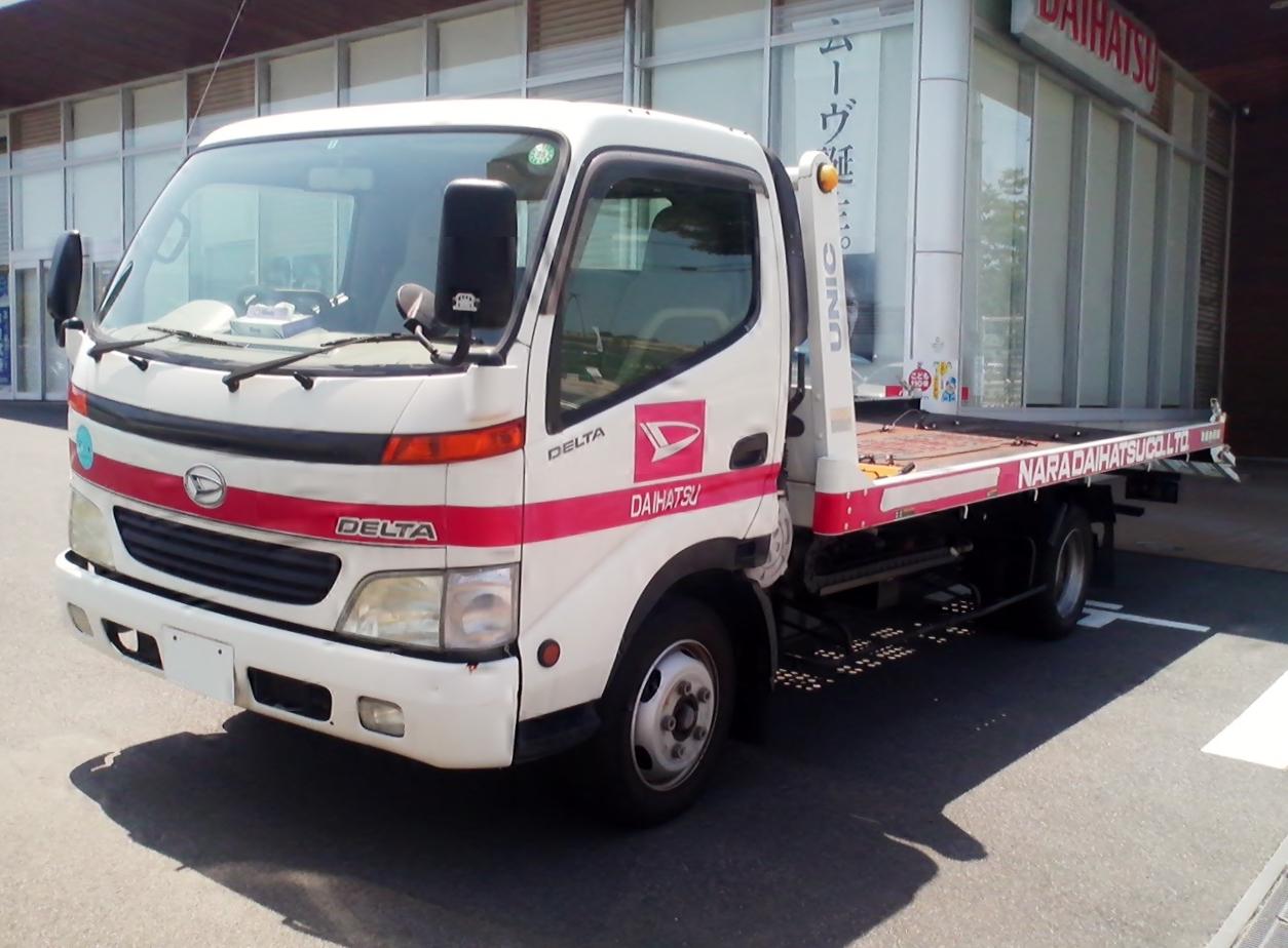 5代目ダイハツ・デルタトラックをフロントから撮影。